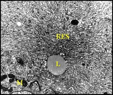 Réticulum stellaire dans une cellule géante de Kaira. Microscope électronique